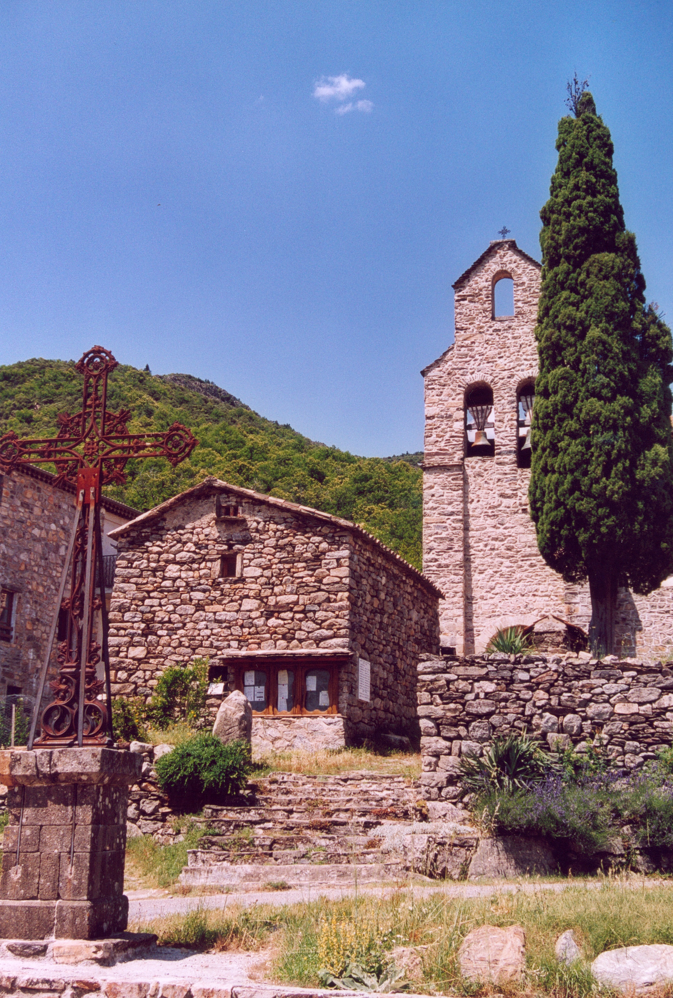 France Ardeche Dompnac Photographie prise par GIRAUD Patrick